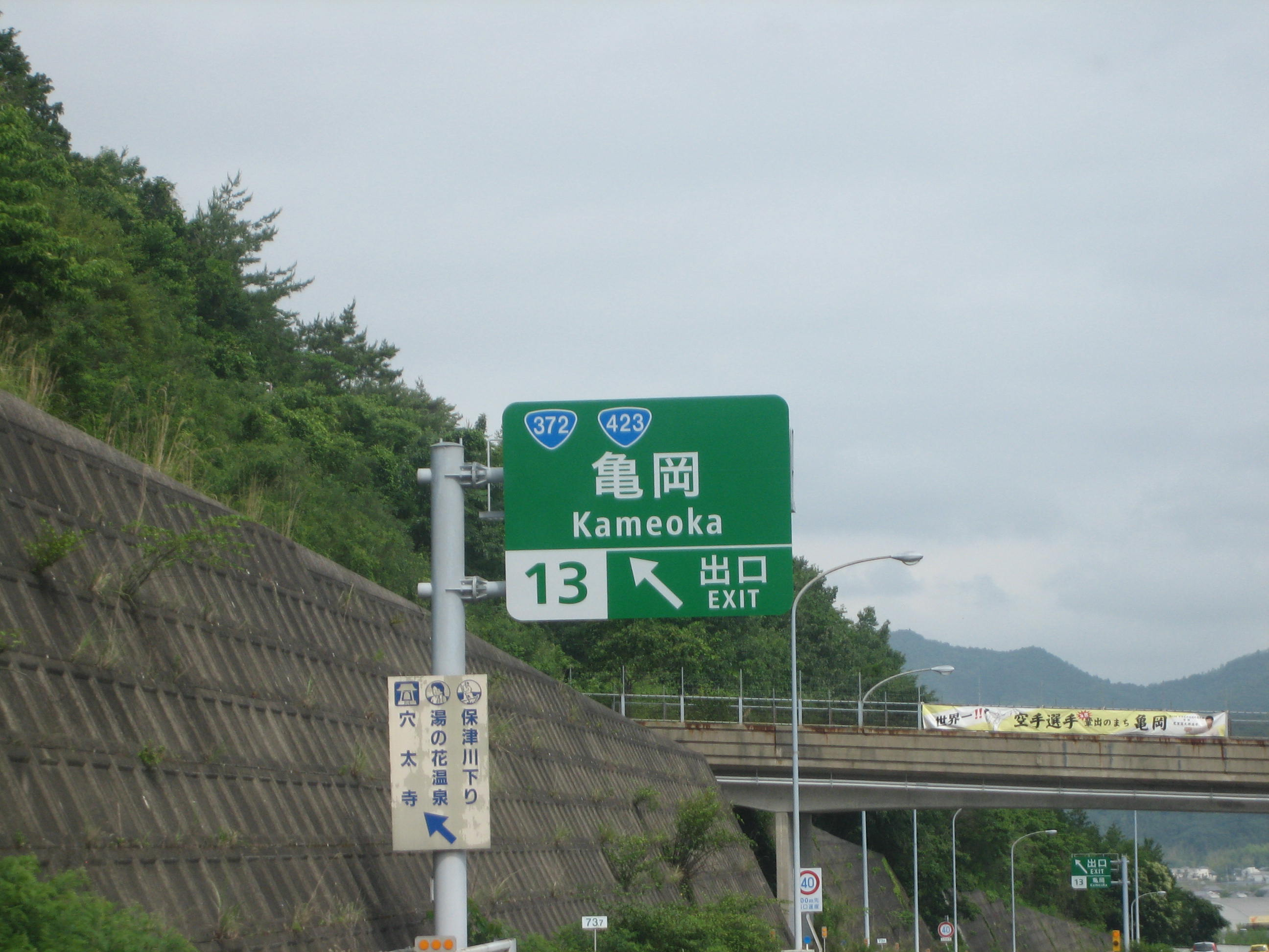 亀岡IC